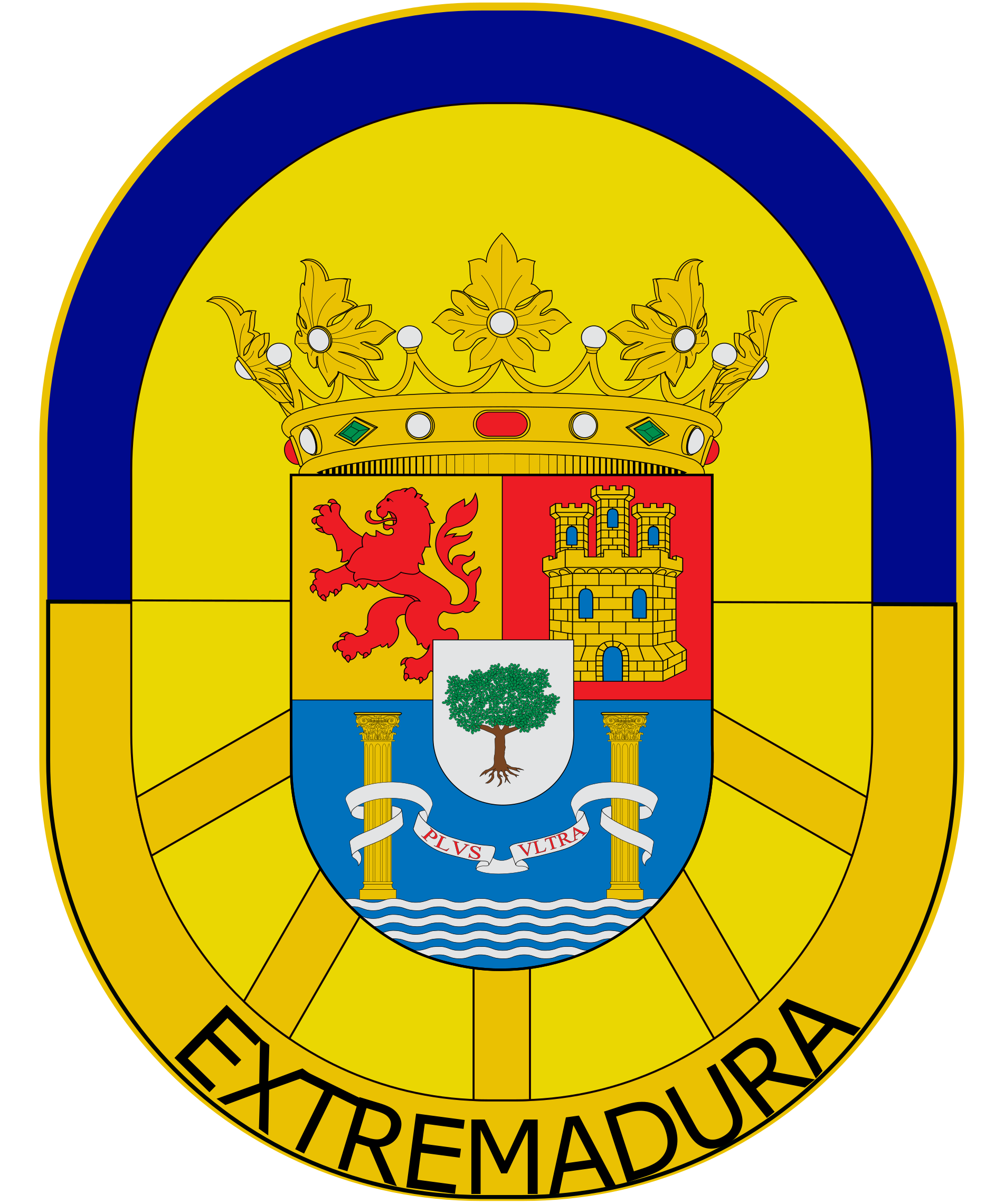 Logotipo de la Medalla de Extremadura